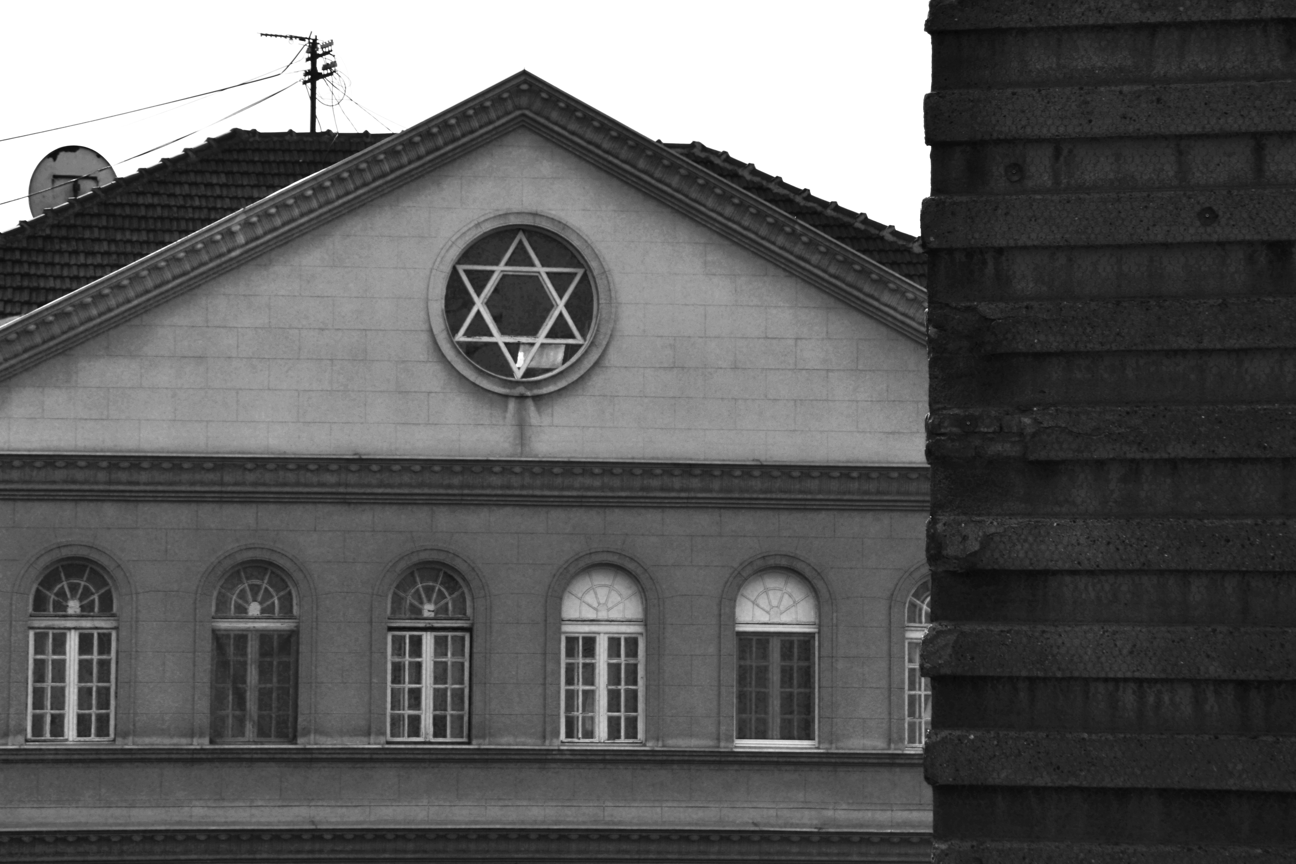 Споменици културе Београд